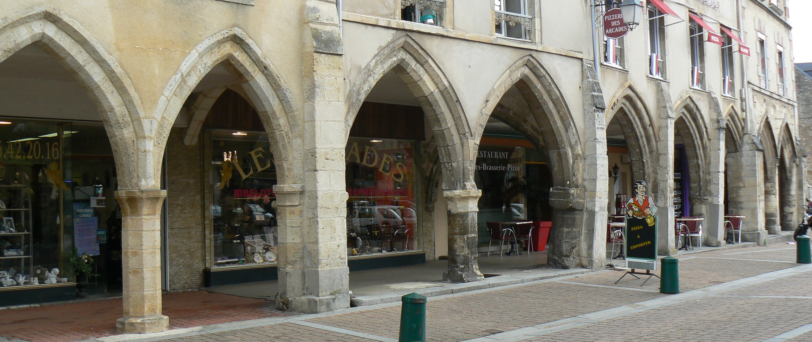 Arcades de la place de la République de Carentan (50)